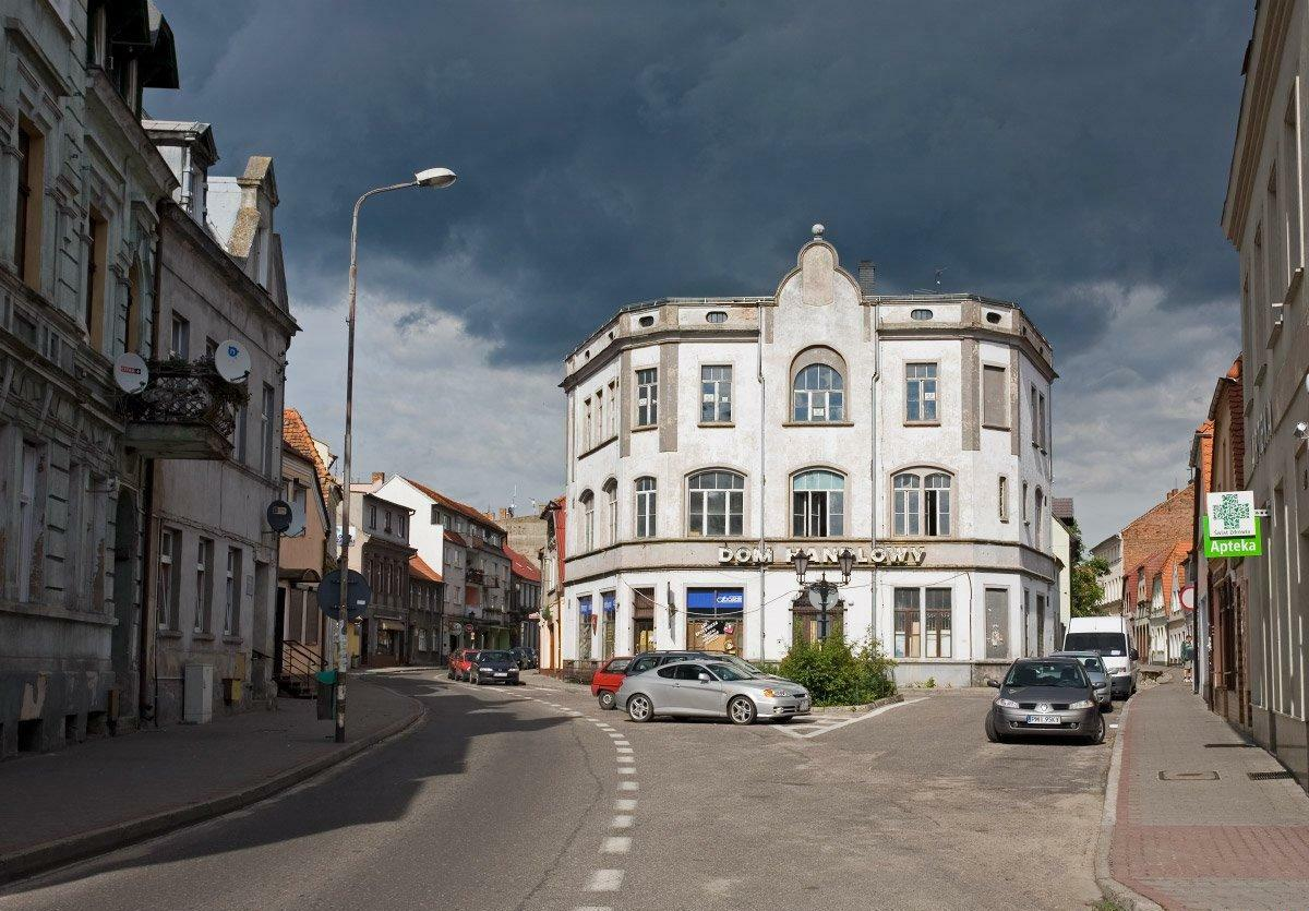 Dawny dom towarowy u zbiegu trzech ulic. Obecnie nieczynny, ostatnio był tu sklep PSS Społem (w likwidacji). Niechcący wyszło porównanie do pocztówki . W budynku wymieniono okna, zniknęły też sterczyny z krawędzi dachu. Ale latarnia przed frontem stoi nadal.